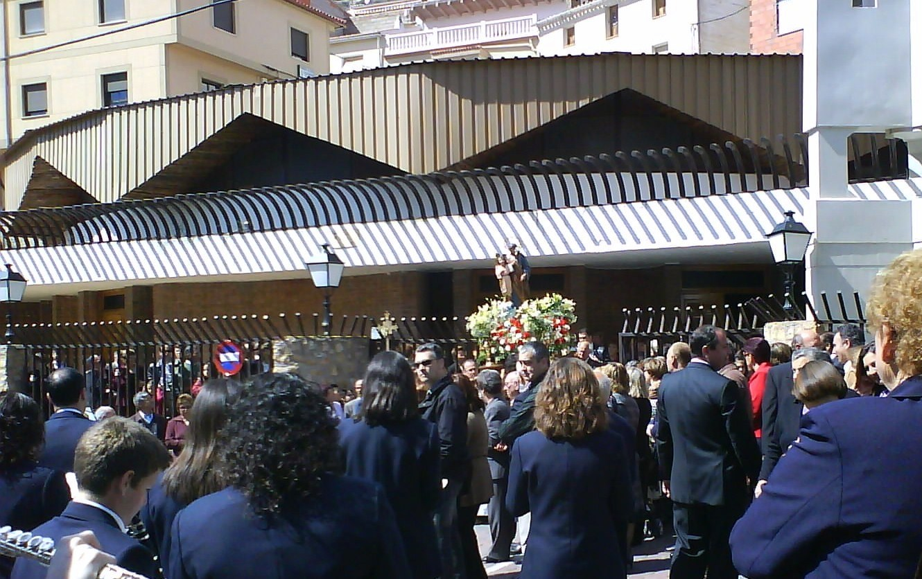 San José, Patrón de Molinicos (Albacete) a su salida de la Iglesia de Nuestra Señora del Carmen durante la celebración de las fiestas patronales en su honor.